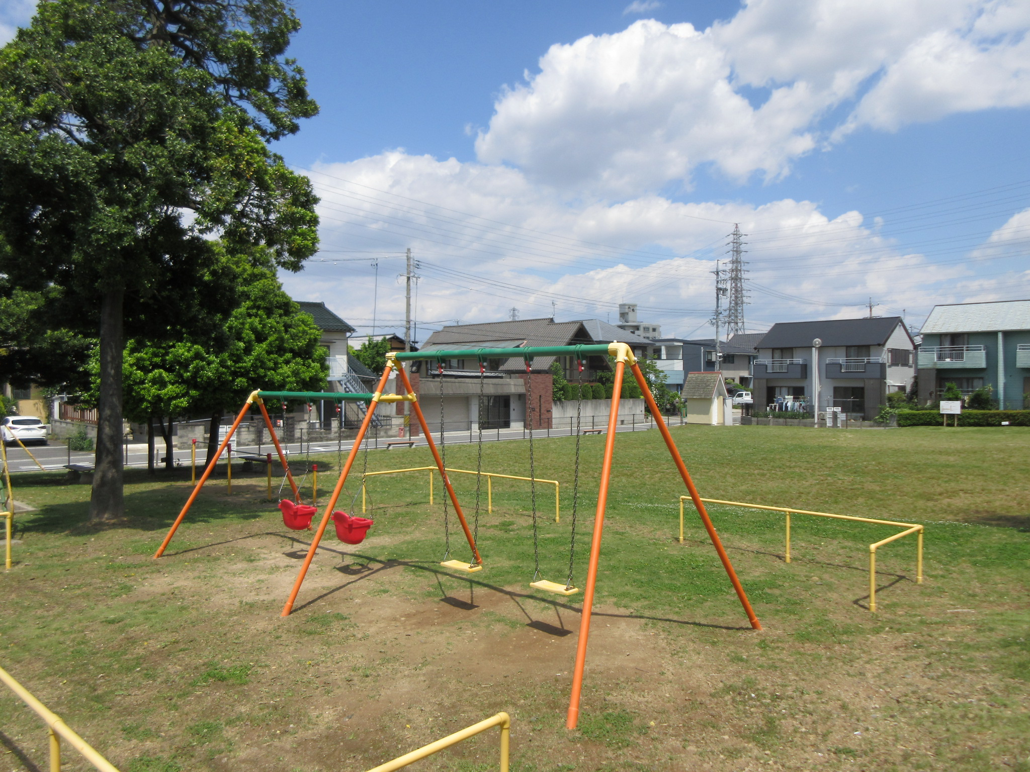 向山公園（岡崎市向山町）